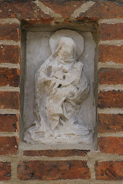 Sculpture St. Anne, St. Peter church, Malmo, Sweden, about 1460.